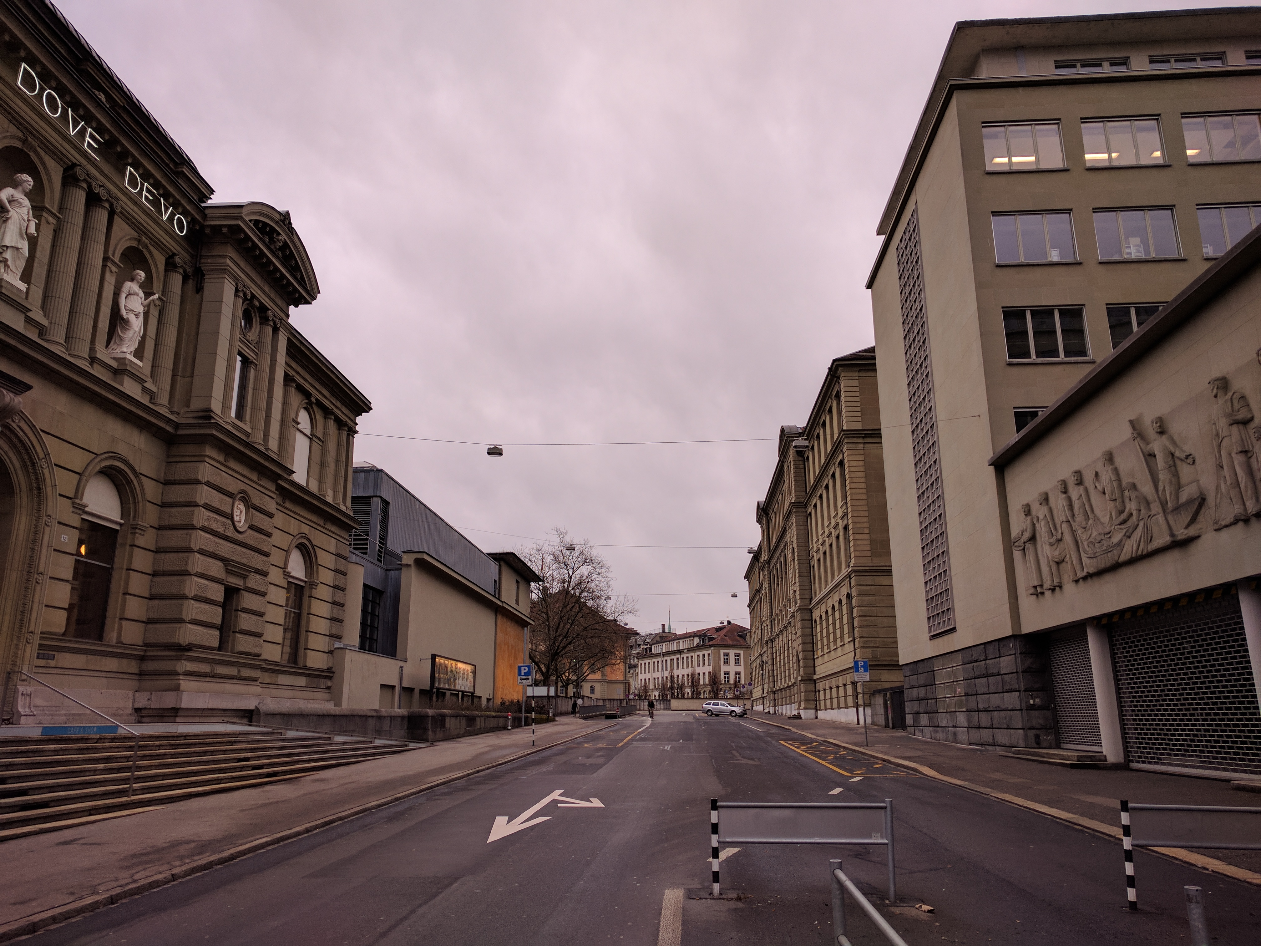 Hodlerstrasse (Bern) mit Sandsteinhochrelief Fischer und Familie (Luigi Zanini 1945) am rechten Bildrand